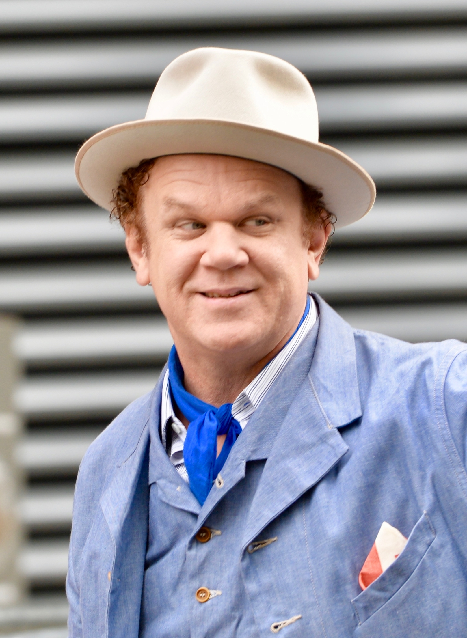 TIFF 2018 - Sister Brothers